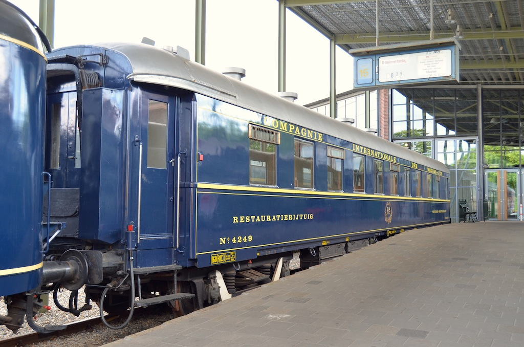 Nederlands Spoorwegmuseum rijtuig CIWL 4249. Foto: Erik Swierstra.